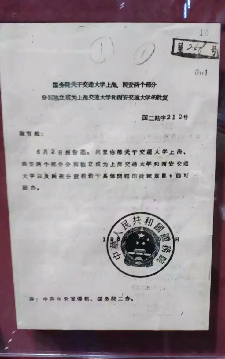 中文（中国大陆）: 《国务院关于交通大学上海、西安两个部分分别独立成为上海交通大学和西安交通大学的批复》（国二陆字212号文，1959年7月31日）的复制本，藏于上海交通大学闵行校区。